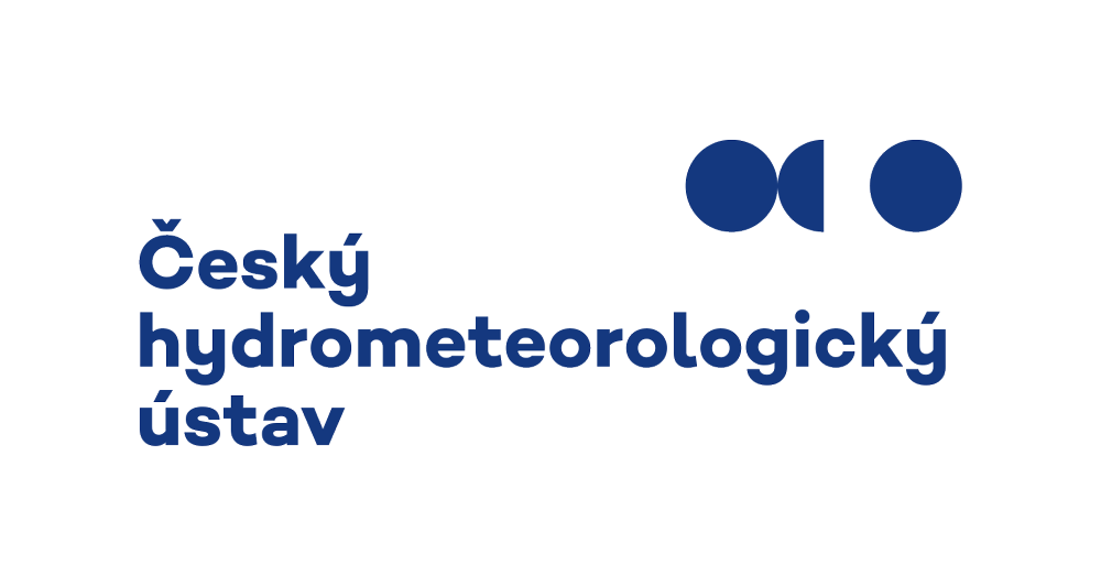 Nová značka ČHMÚ, kterou organizace používá od začátku roku 2020.